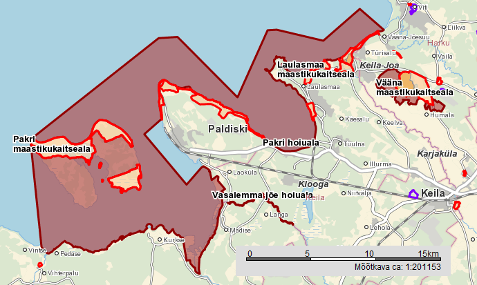 Pakri hoiuala kaart. Põhineb Maa-ameti kaardil.